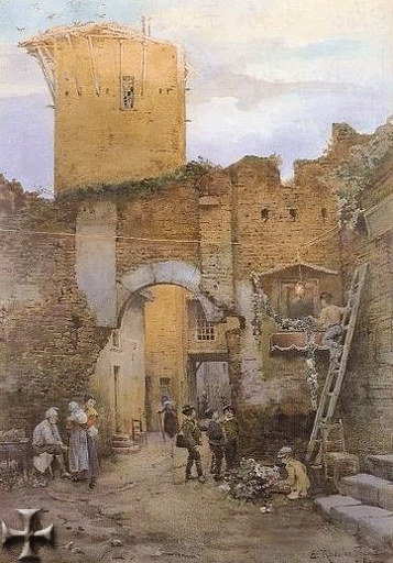 Fortezza degli Anguillara (Arco Annunziata) in Rome (rione Trastevere)